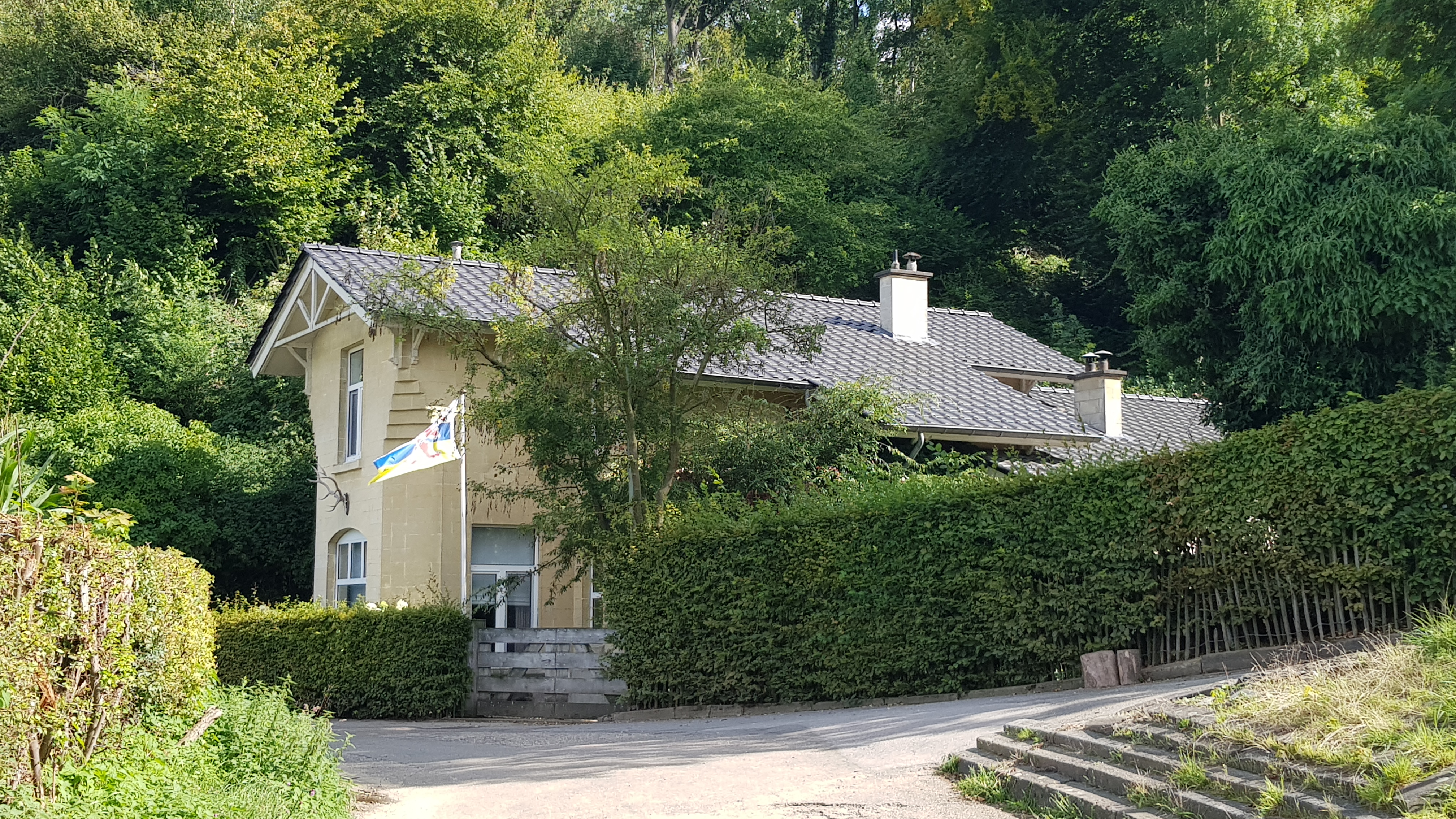 Pompstation Heytgracht, Valkenburg aan de Geul, Nederland